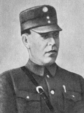 Aleksandr Ivanovich Cherepanov (Александр Иванович Черепанов), Soviet General (b.1895-d.1984)